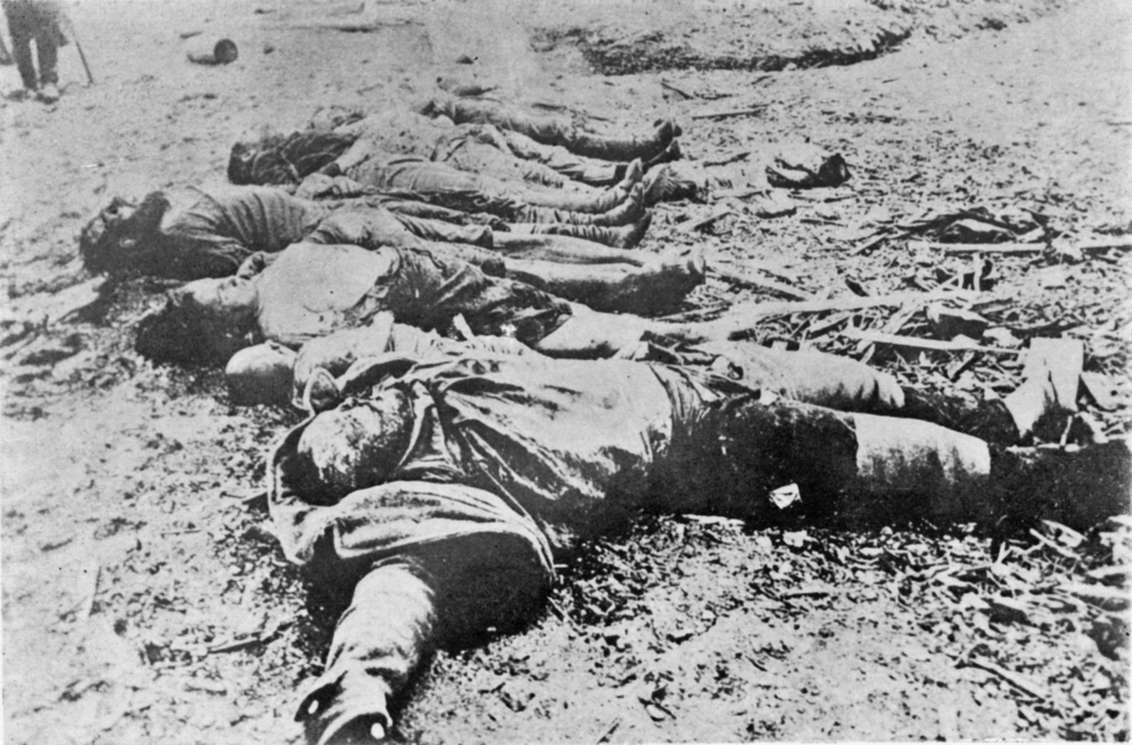 アムール河畔に打ち上げられた虐殺死体（尼港事件）